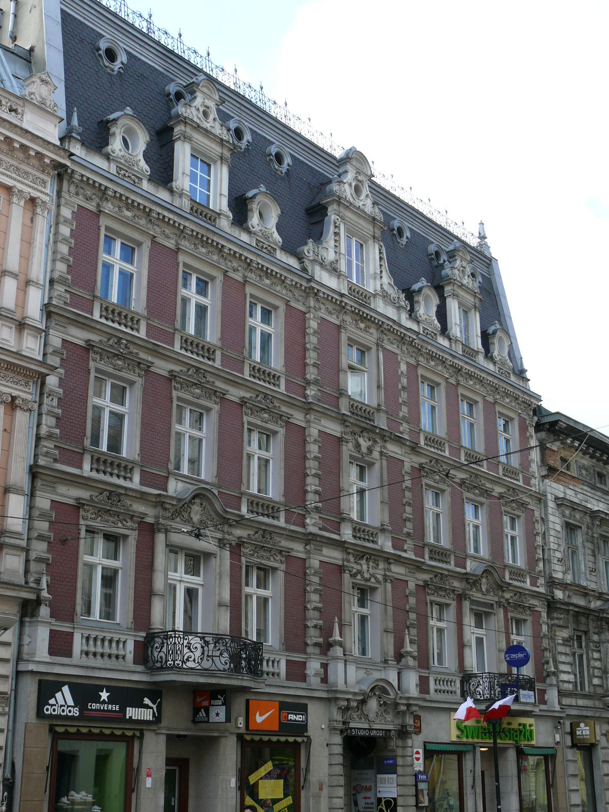 Kamienica Piotrkowska 51 w Łodzi